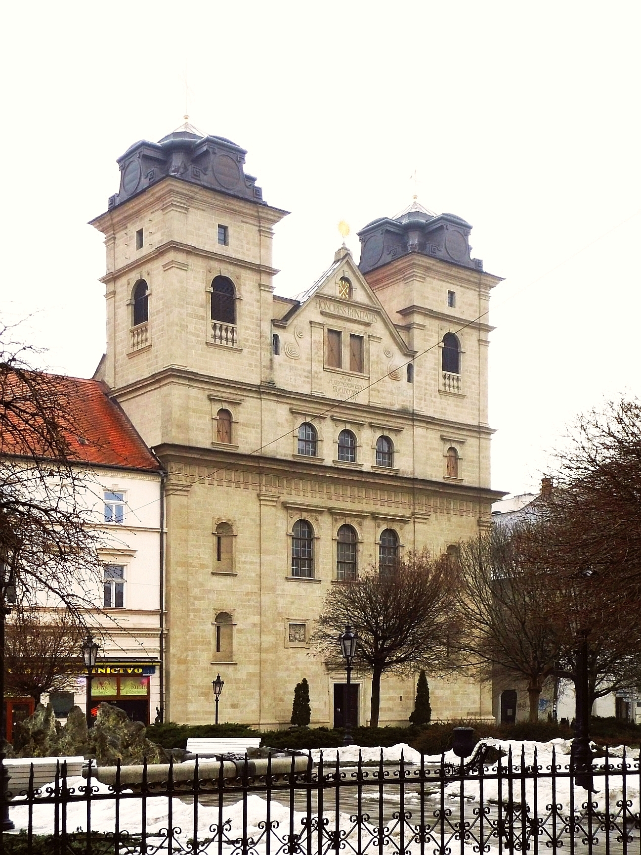 Kerk van de Heilige Drievuldigheid (Košice) (Slowakije) - Gevel (links)